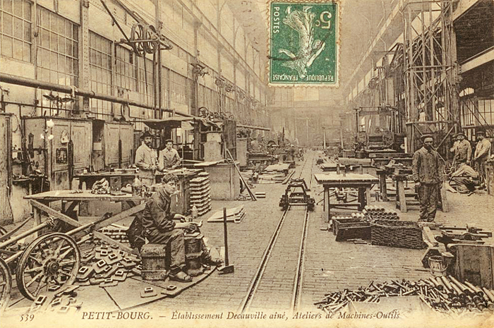 Petit-Bourg - Etablissement Decauville aine, Ateliers de Machines-Outils